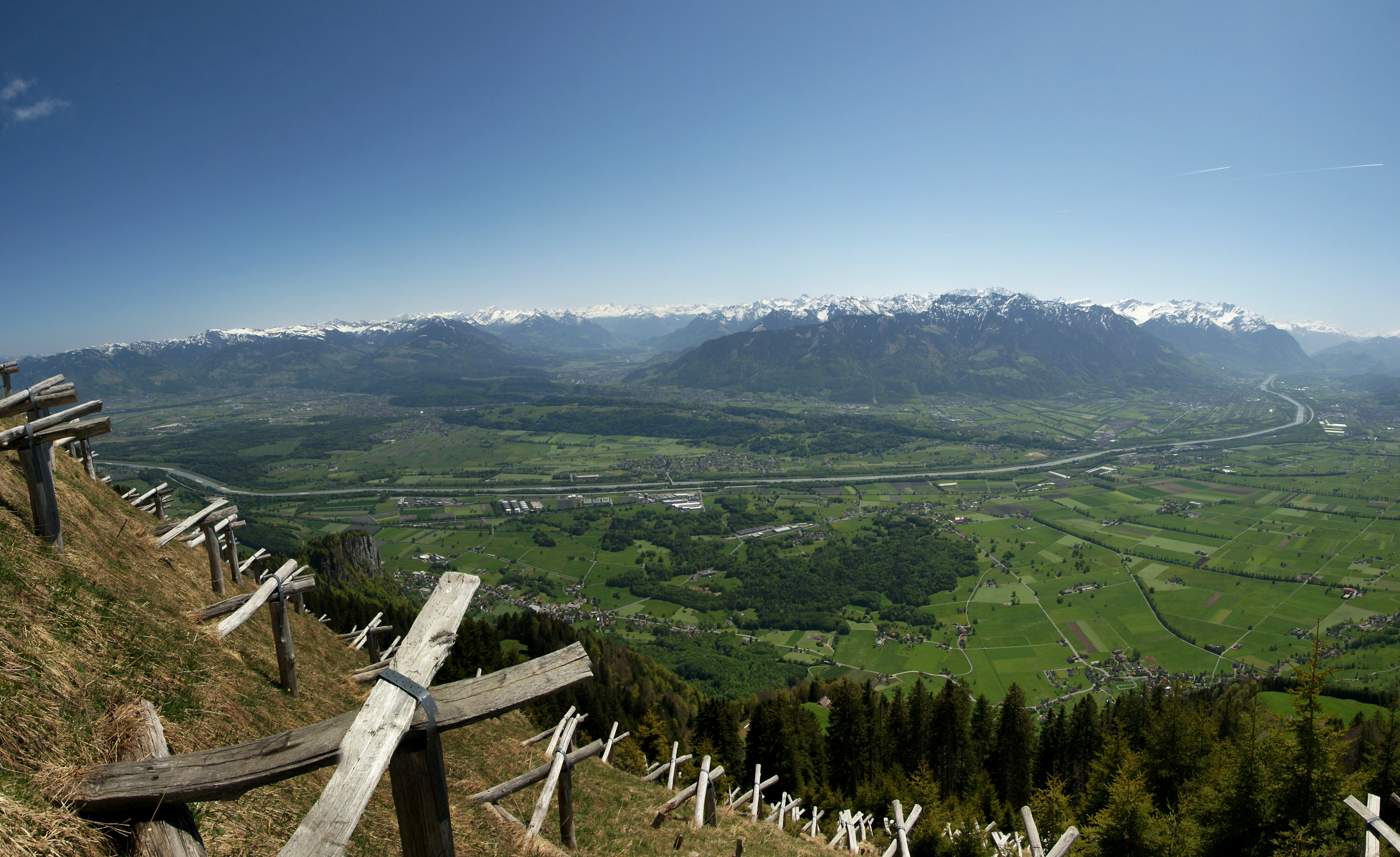 Panorama vom Stauberenfirst auf 1693m. Blick über die Frümsner Alp ins Rheintal nach Liechtenstein und Vorarlberg. Im Vordergrund ein Verwehungsverbau zur Lawinensicherung.